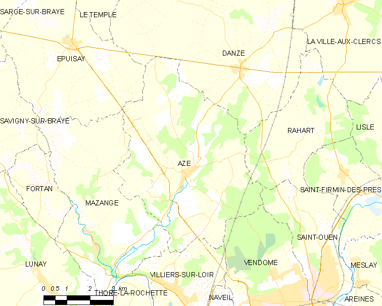 Carte des communes de France, centrée sur Azé (Loir-et-Cher, code Insee 41010)